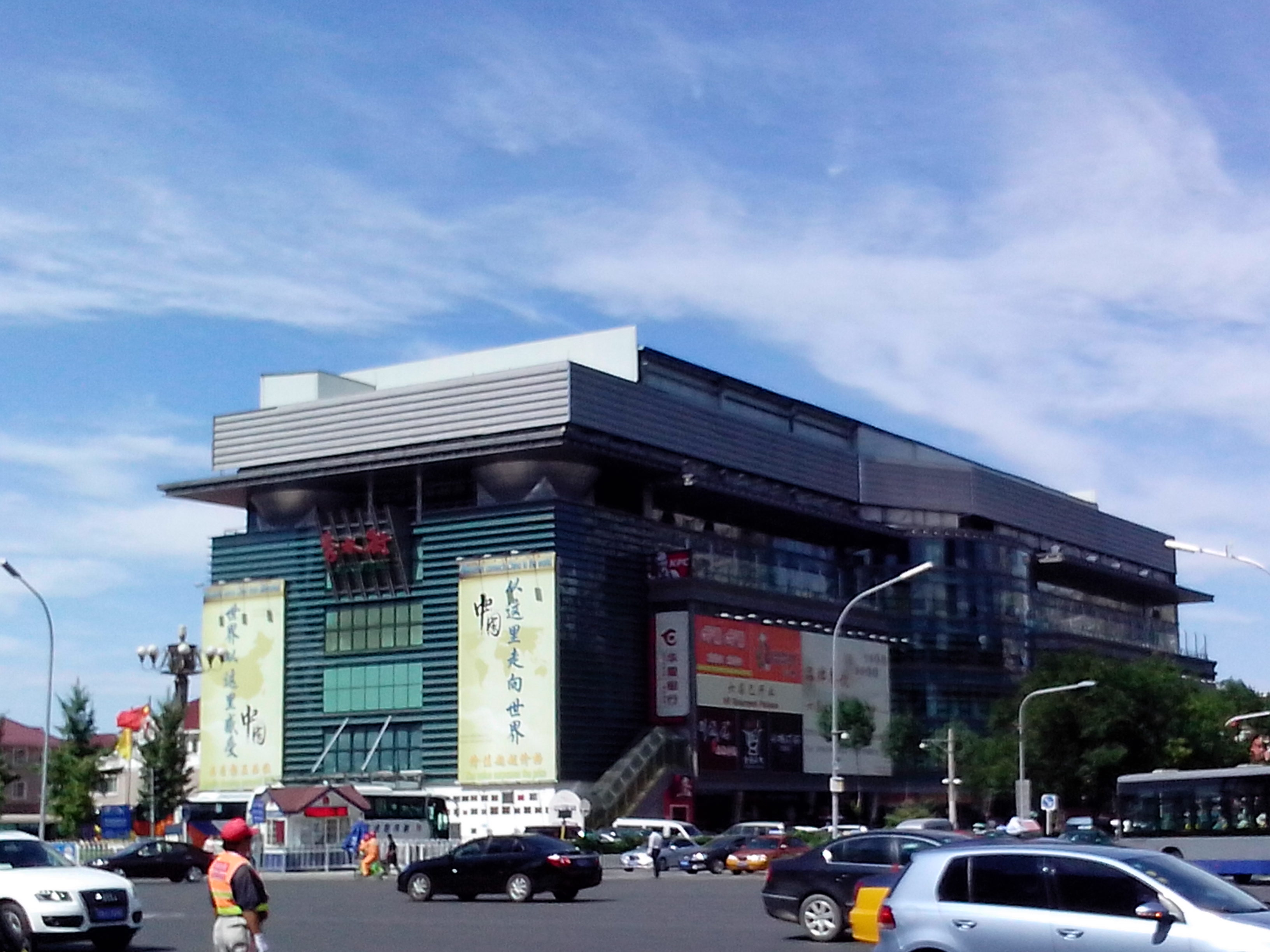 中文（中国大陆）: 北京秀水街